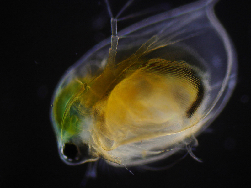 Blattfußkrebs, 100x, Dunkelfeld